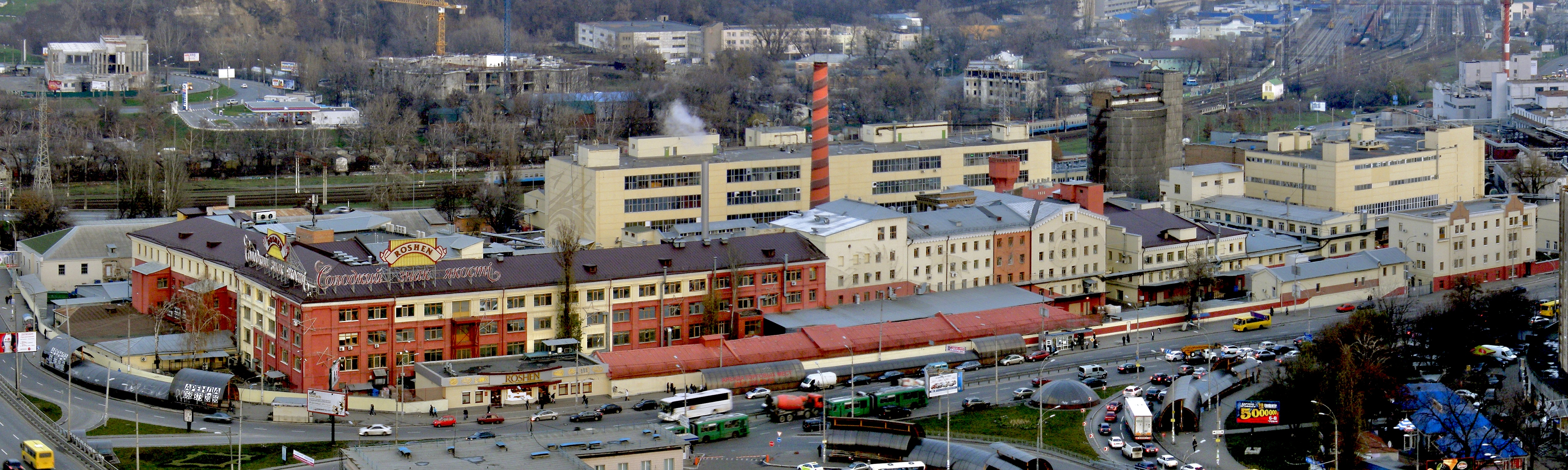 Кондитерская фабрика им. Карла Маркса в Киеве